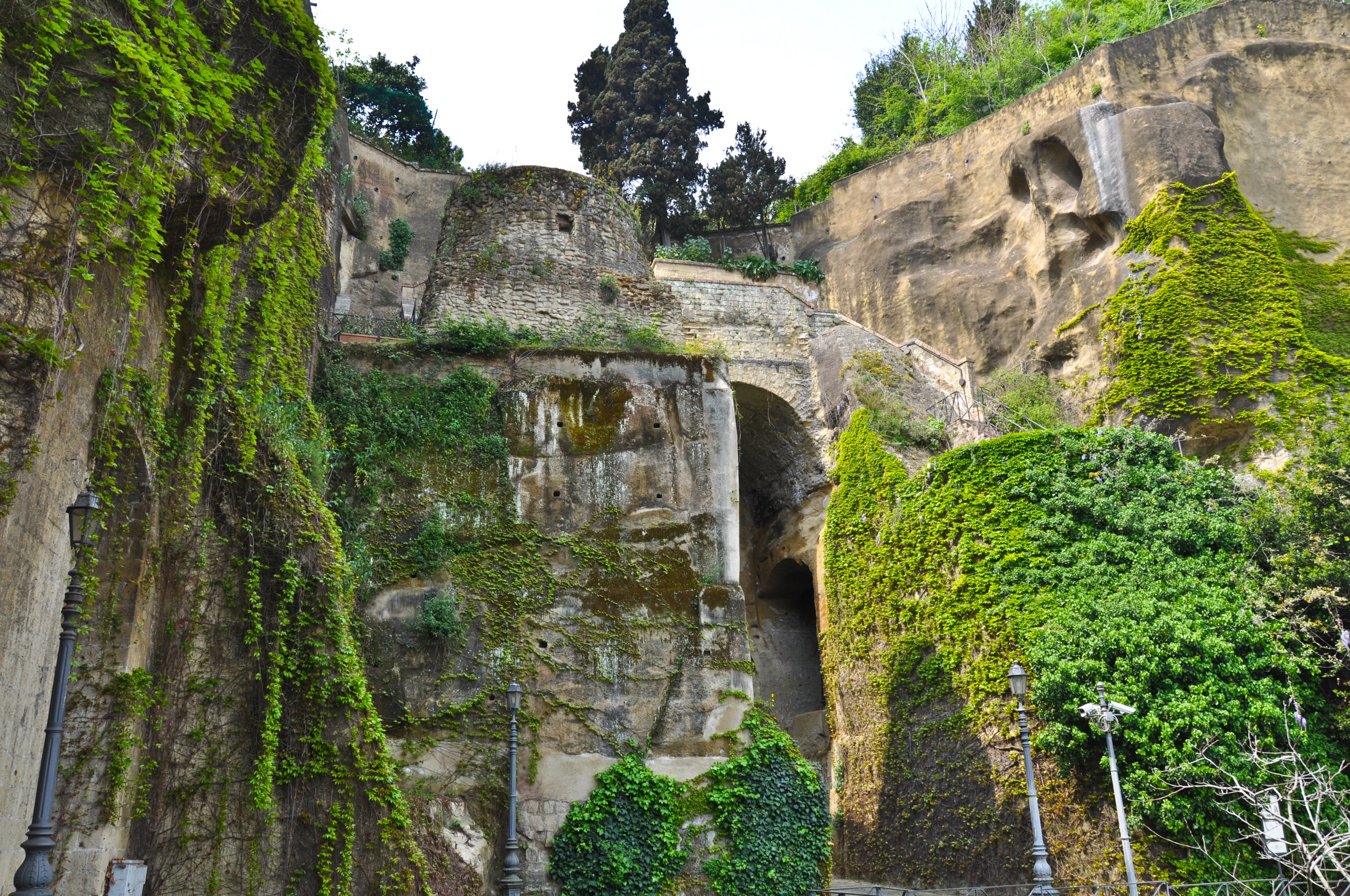 Sepolcro di Virgilio (Parco Vergiliano, Napoli)